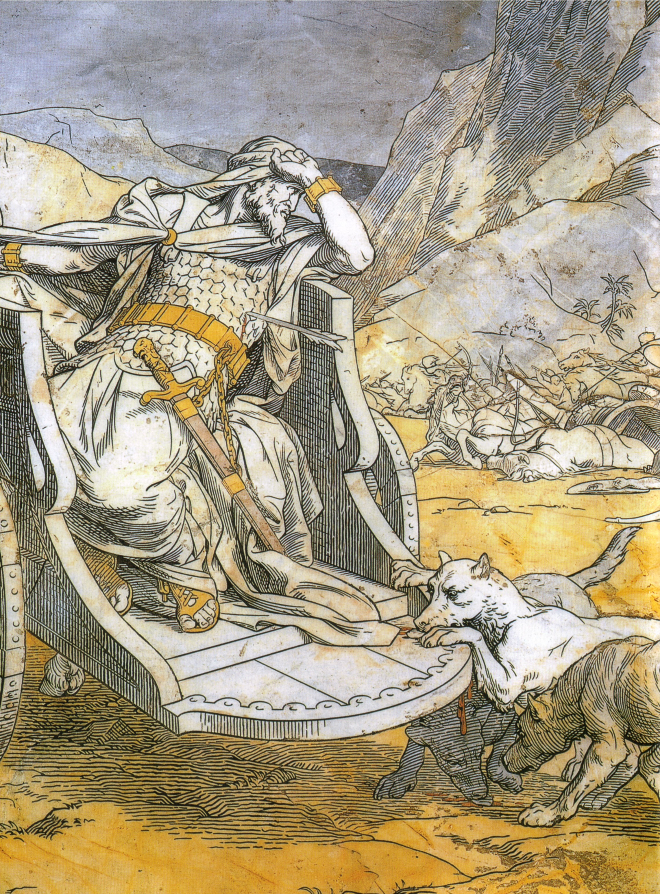 Pavimento di siena, esagono, morte di acab (alessandro franchi)